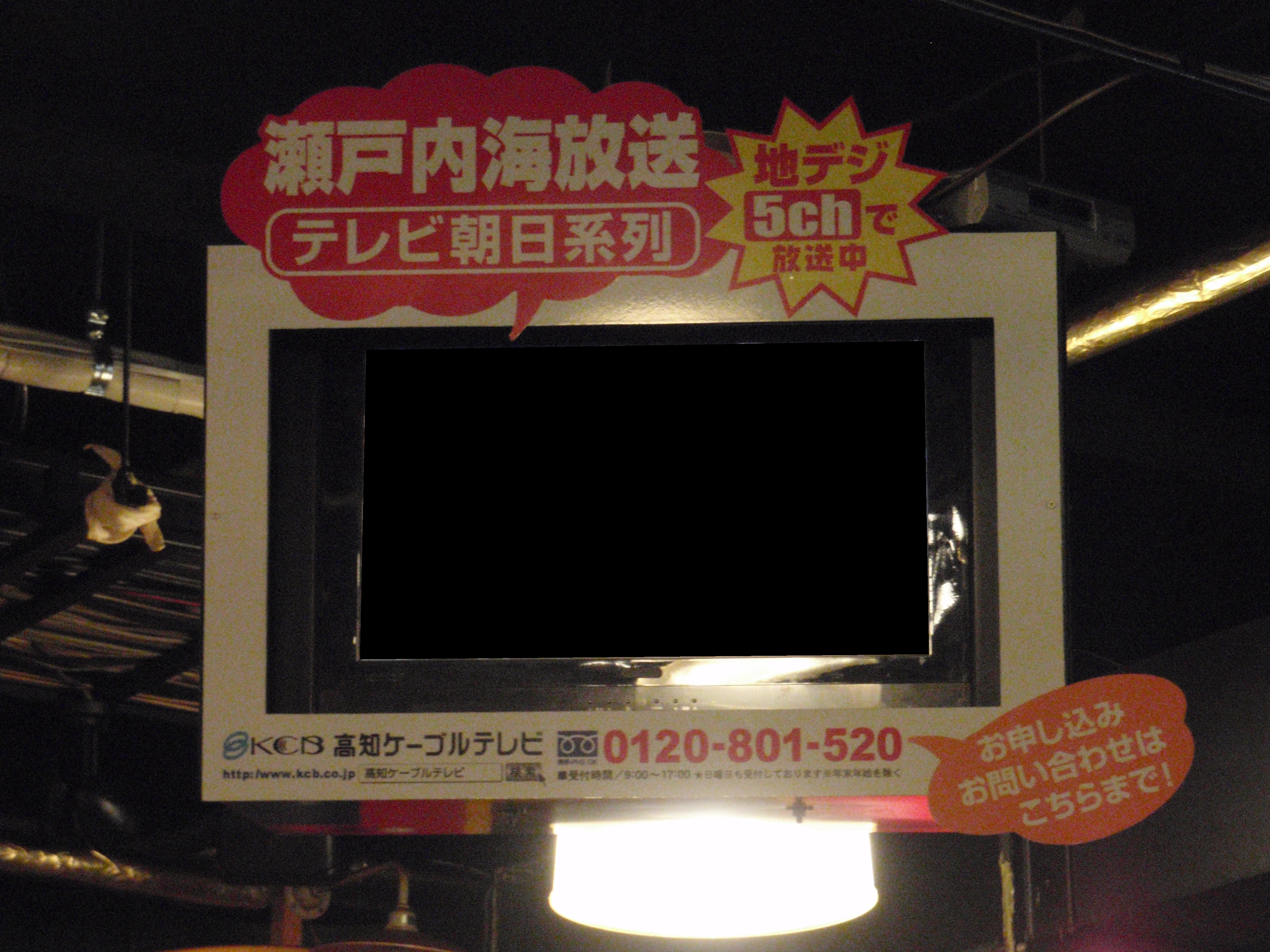 高知県高知市のひろめ市場内に設置されているテレビ。設置されている高知ケーブルテレビの加入案内広告では、高知県内には無いテレビ朝日系列の瀬戸内海放送（香川県）の区域外再放送を売りにしている。